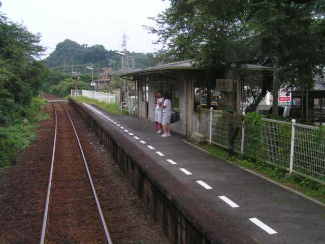 東都筑駅